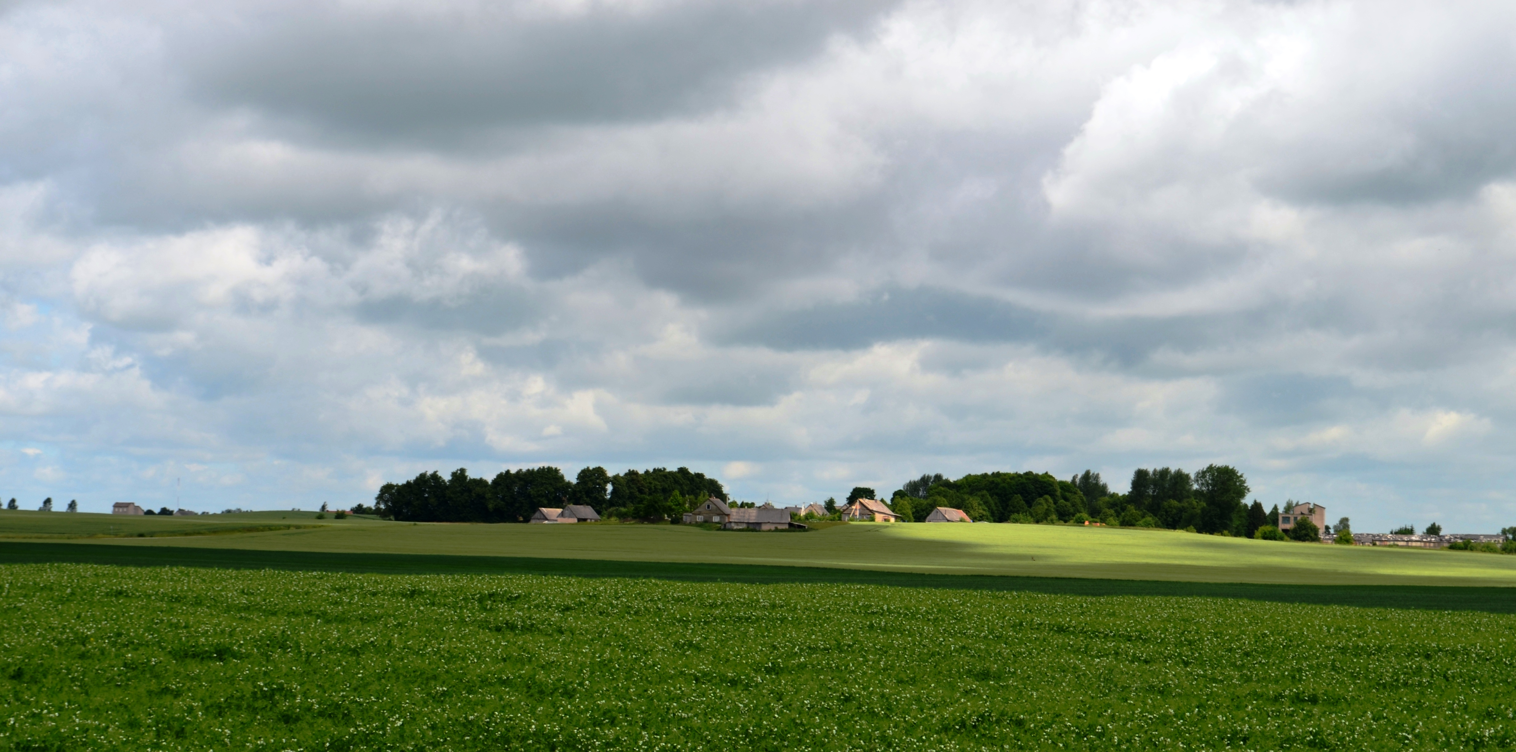 Pališkiai, Kėdainių raj.